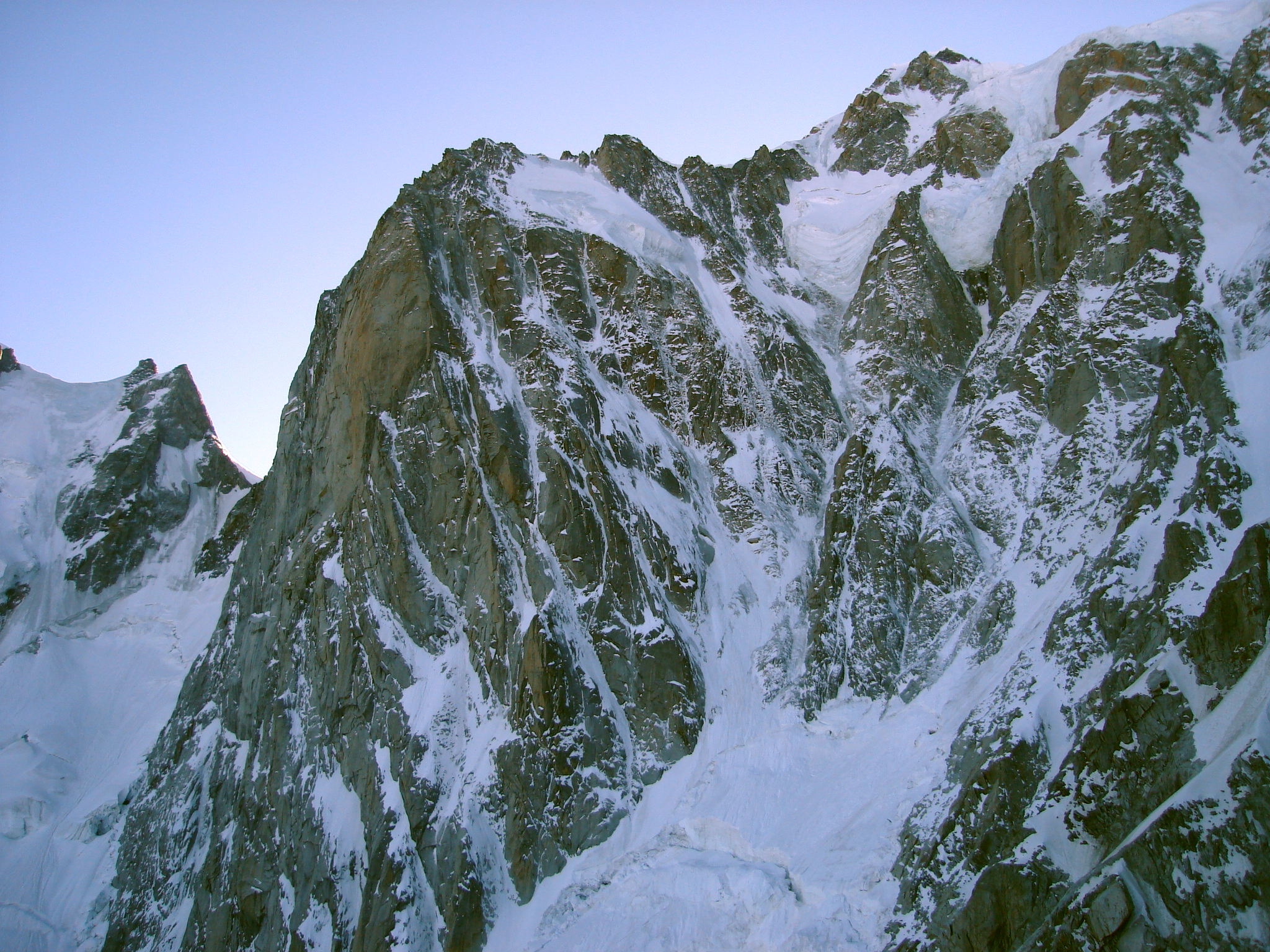 Grand Pilier d'Angle - face Nord - Mont-Blanc